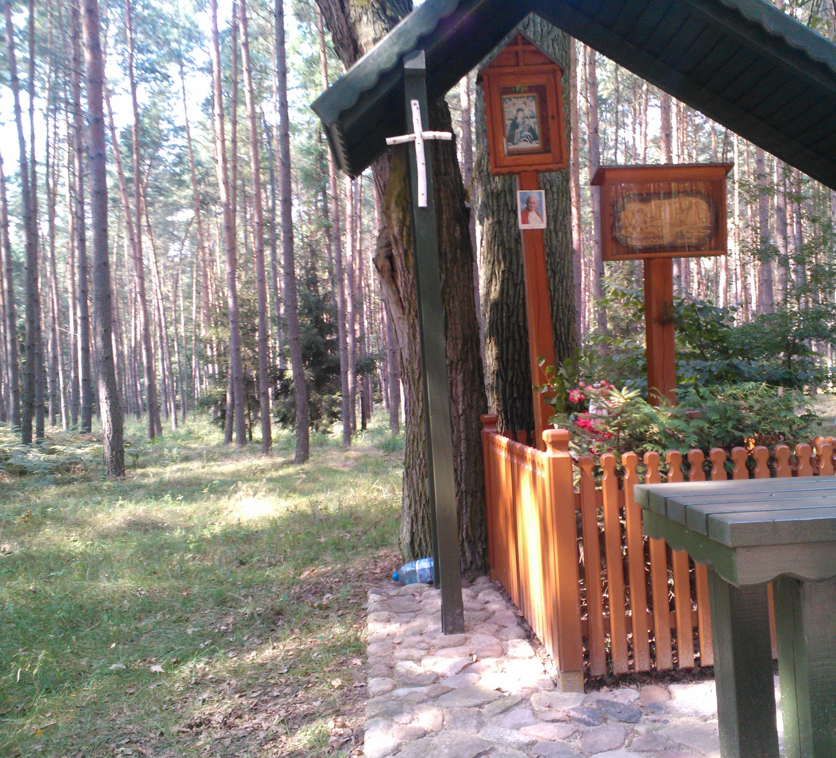 Zapust - kapliczka Św Huberta w lesie przy drodze do Koźla w otoczeniu grupy dębów.